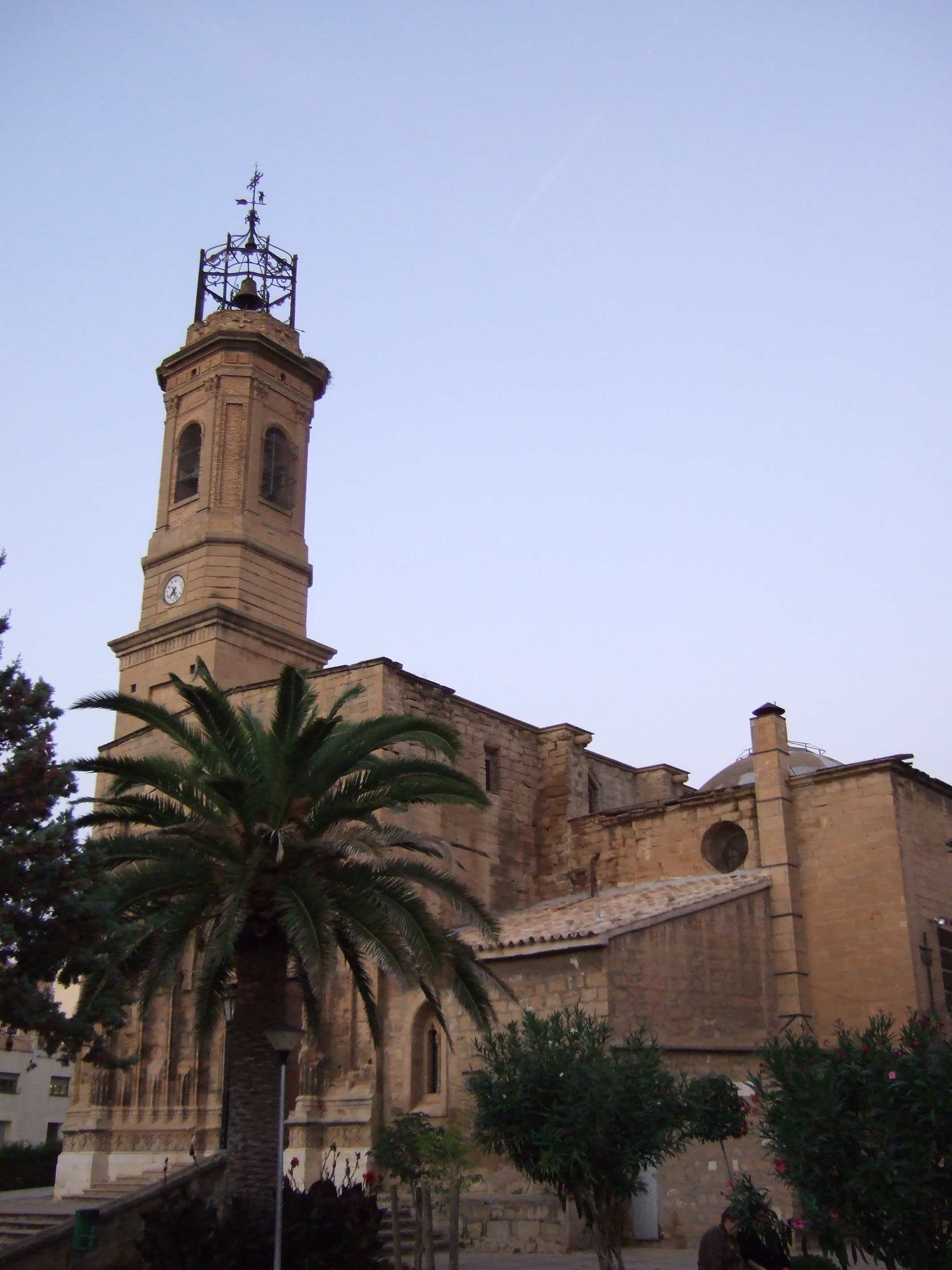 Caspe - Colegiata de Sta María la Mayor siglos XII al XVIII; estilo Gotico